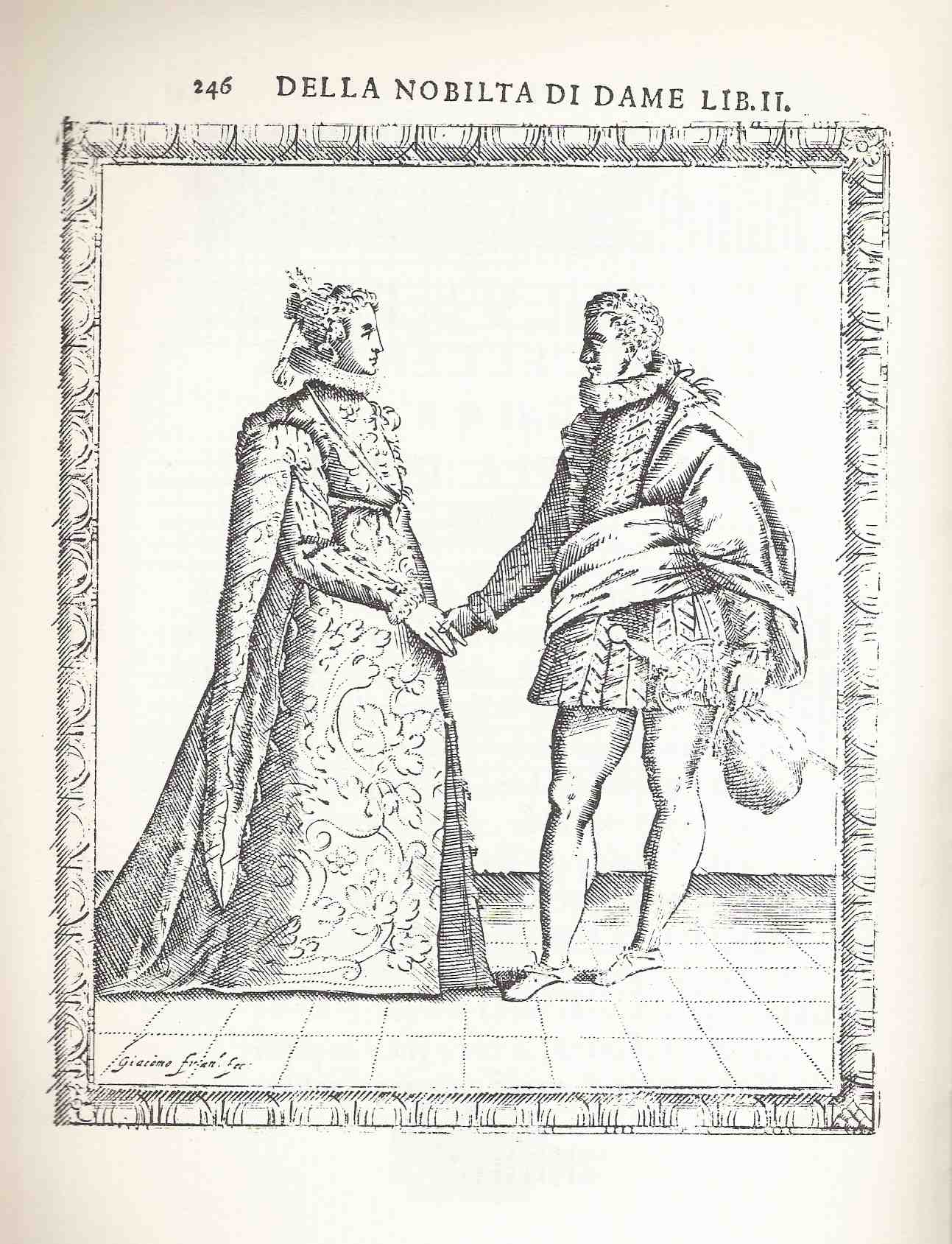 Fabritio Caroso, Nobiltà di Dame, Venise 1600. Réimpression Bologne 1980.